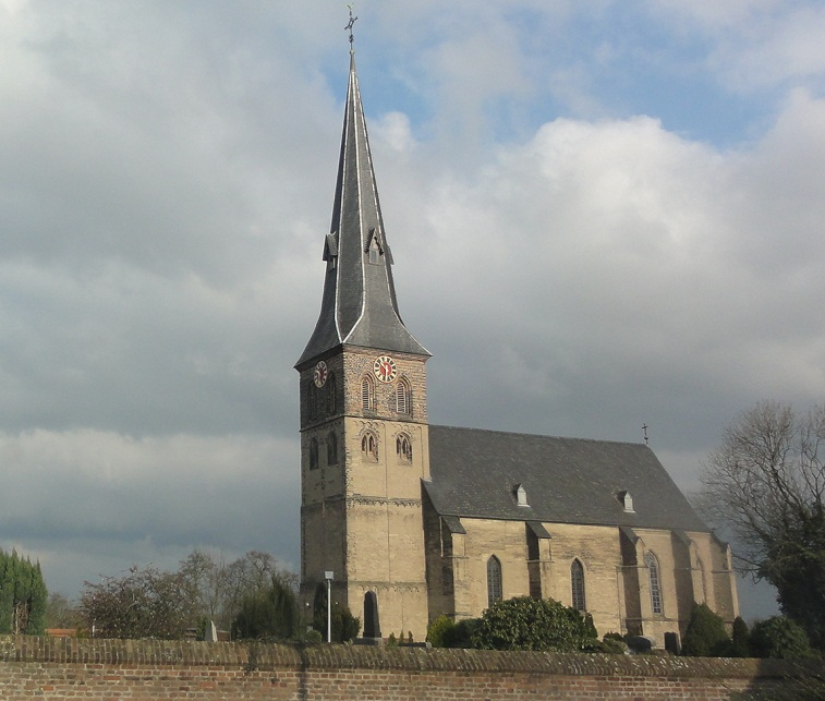 Halen Schwesterkirche Baerl als Anschauungsbeispiel